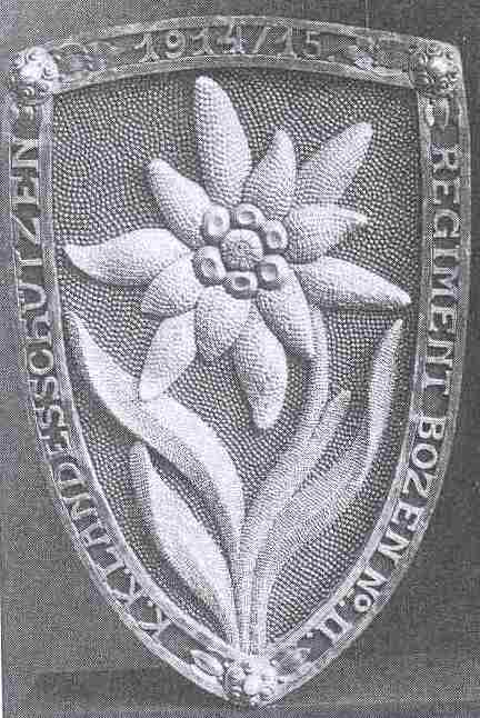 Das von Adolph Johannes Fischer 1915 entworfene und gestaltene "Eiserne Edelweiß" über das die „Wiener Zeitung“ am 27. November 1915 unter anderem Folgendes berichtet hat: „Der Wehrschild, ein großes Edelweiß, das dem Regiment [Landesschützenregiment Nr.II] verliehene Feldzeichen, wurde in mächtiger monumentaler Wirkung von Professor Ad. Joh Fischer geschaffen, der auf Einladung des Offizierskorps der erhebenden Feier beiwohnte. Der Wehrschild wird zur Vernagelung auch an die Front gesendet und sodann im Regimentsmuseum ausgestellt werden.“ Seit 2011 ist Fischers Wehrschild im „Tirol Panorama“ zu sehen: Die folgende Pressefotografie zeigt Fischers Wehrschild im Abschnitt der „Tiroler Kaiserschützen“.